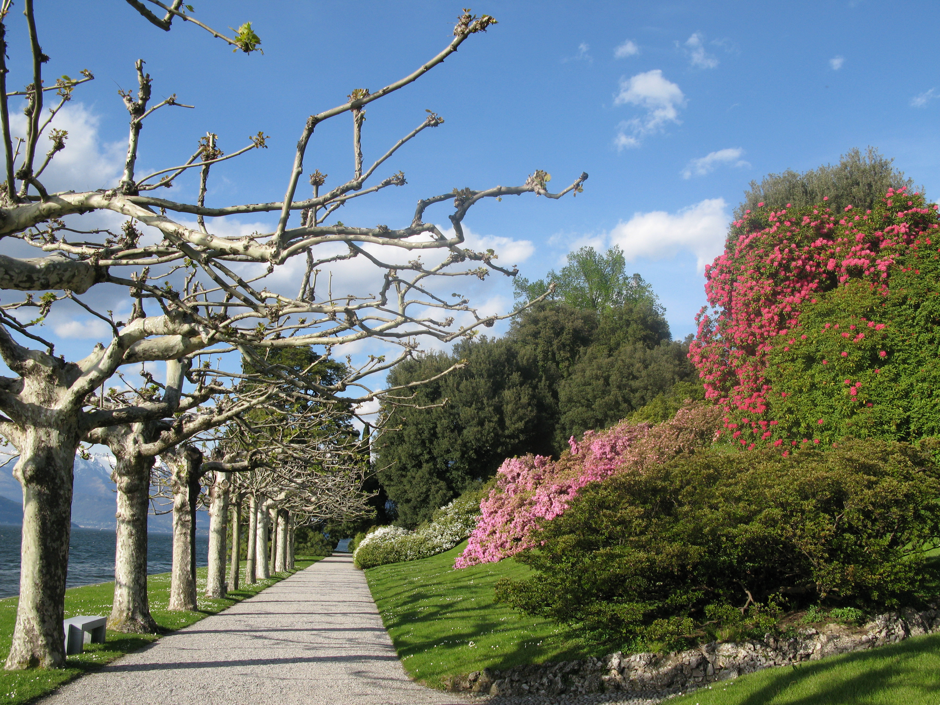 Villa Melzi Gardens, Bellagio, Italy